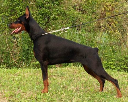 Izrafel Maya di Altobello